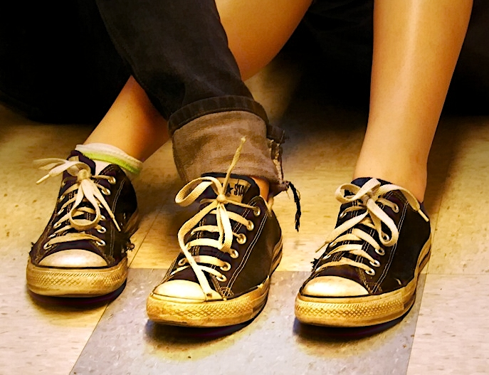 Sneaker mit Reihen von runden Schnürösen sowie weißen Schnürsenkeln.